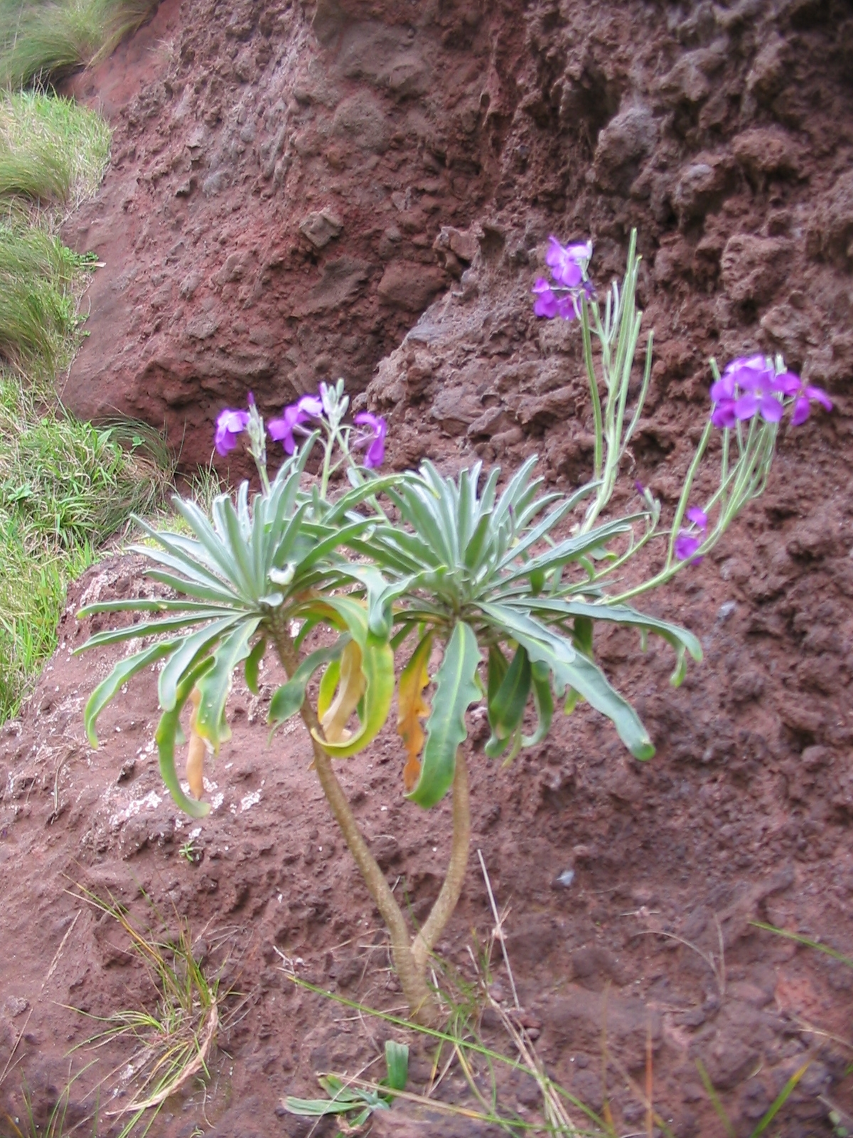 Gartenlevkoje (Matthiola incana) - Habitus in situ